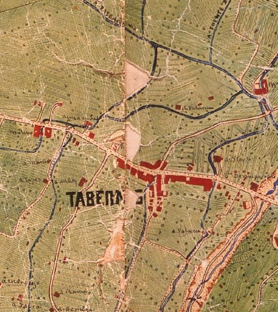 Tavernes Blanques el 1883 (el nord està a la dreta).